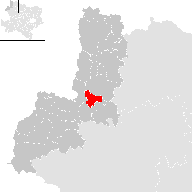 Bezirk Gmünd